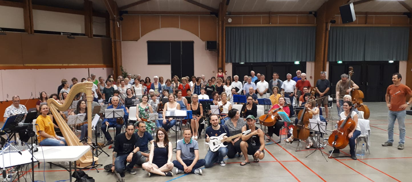 Origine et l'orchestre de musiciens pour Ouroboros Orchestra